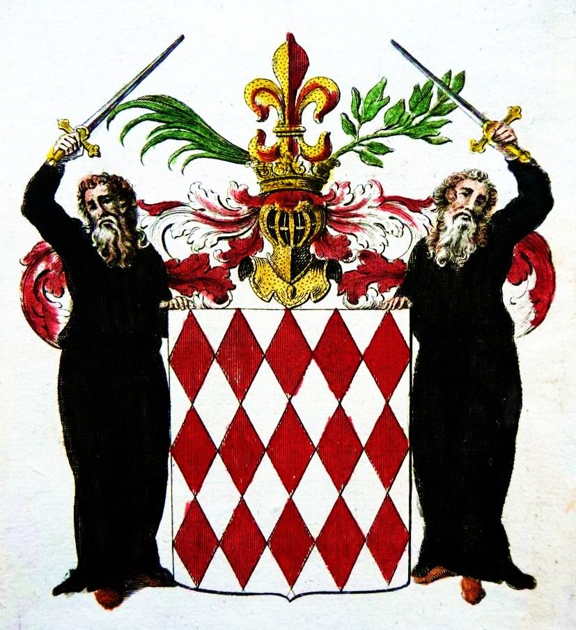 Wappen des Fürstens von Monaco (Vollwappen mit Schildhaltern (Mönche mit Schwertern); Helmzier: Lilie zwischen einem Palmzweig und einem Lorbeerzweig)